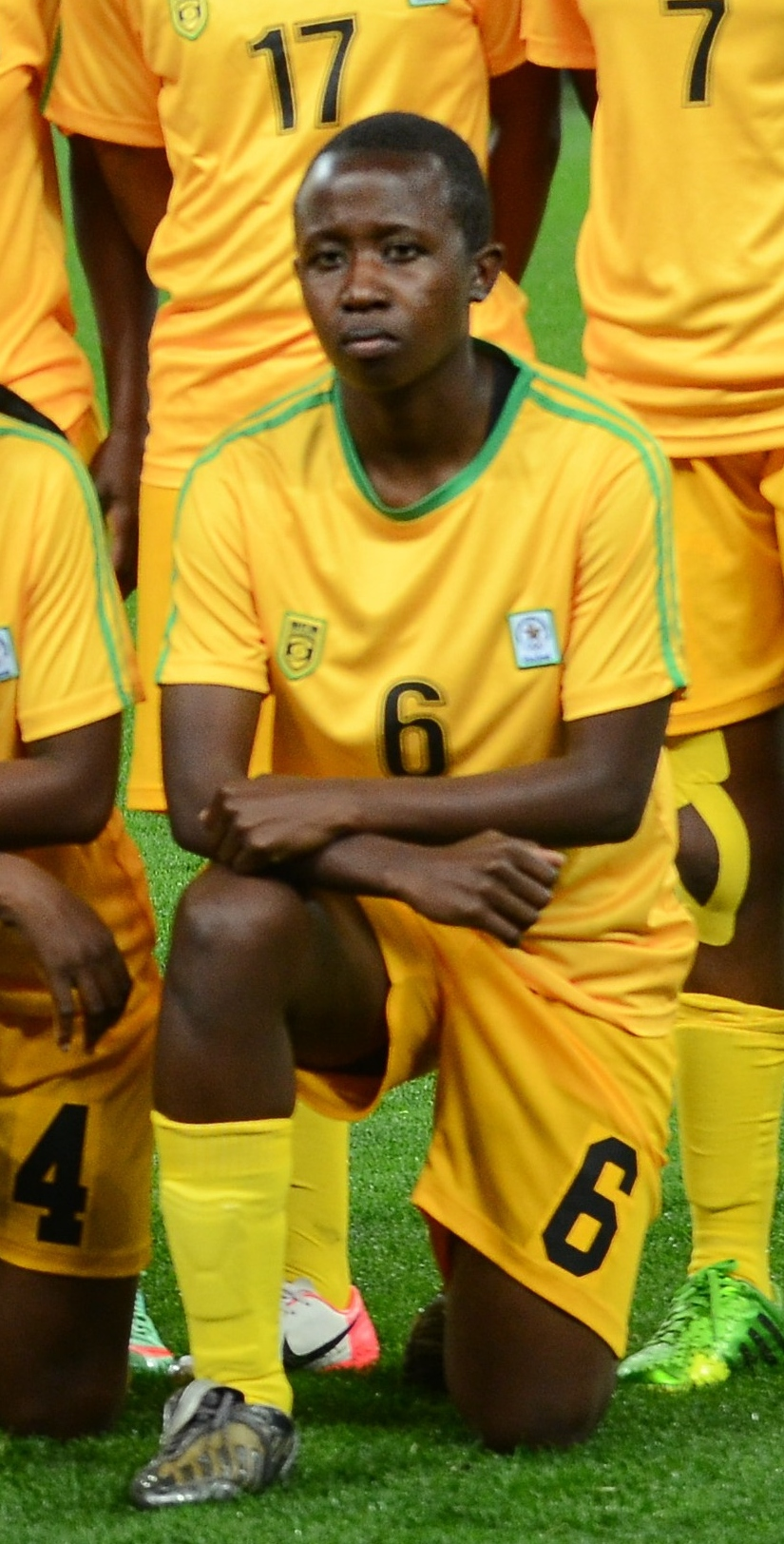 São Paulo - Seleções femininas do Zimbábue e da Alemanha se enfrentam na Arena Corinthians (Rovena Rosa/Agência Brasil)